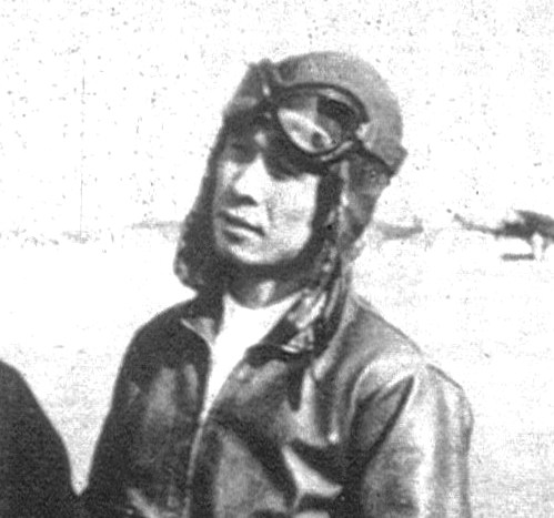 飛鷹飛行隊長時代の兼子正